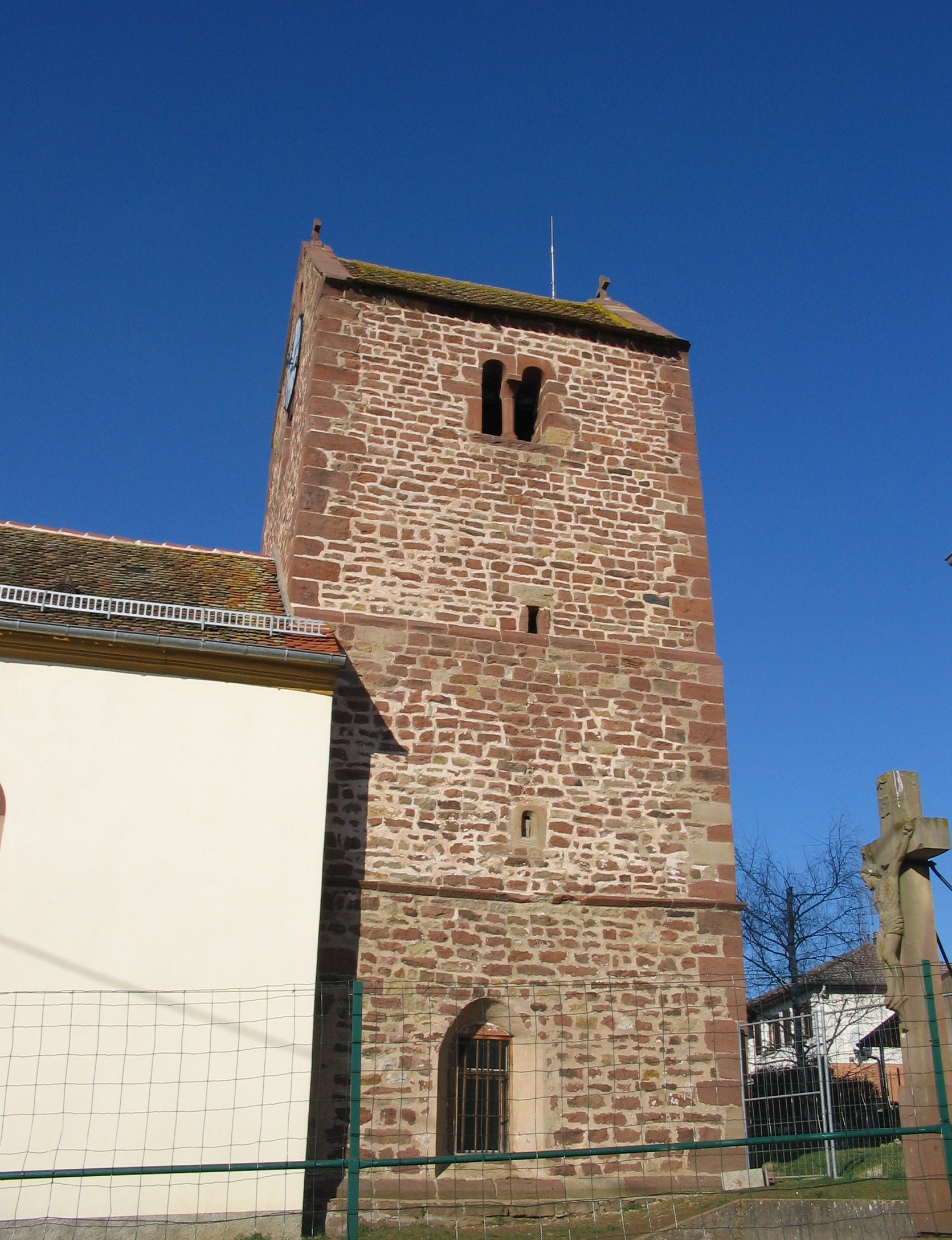 Église Saint Maurice à Salenthal. Tour choeur probablement du XIIIe siècle